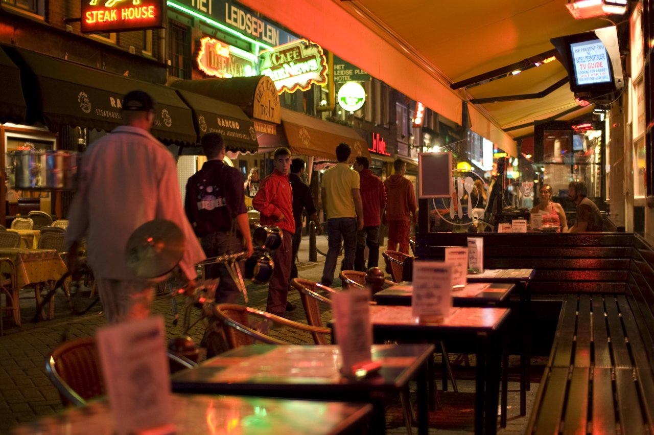 Image of Leidseplein.